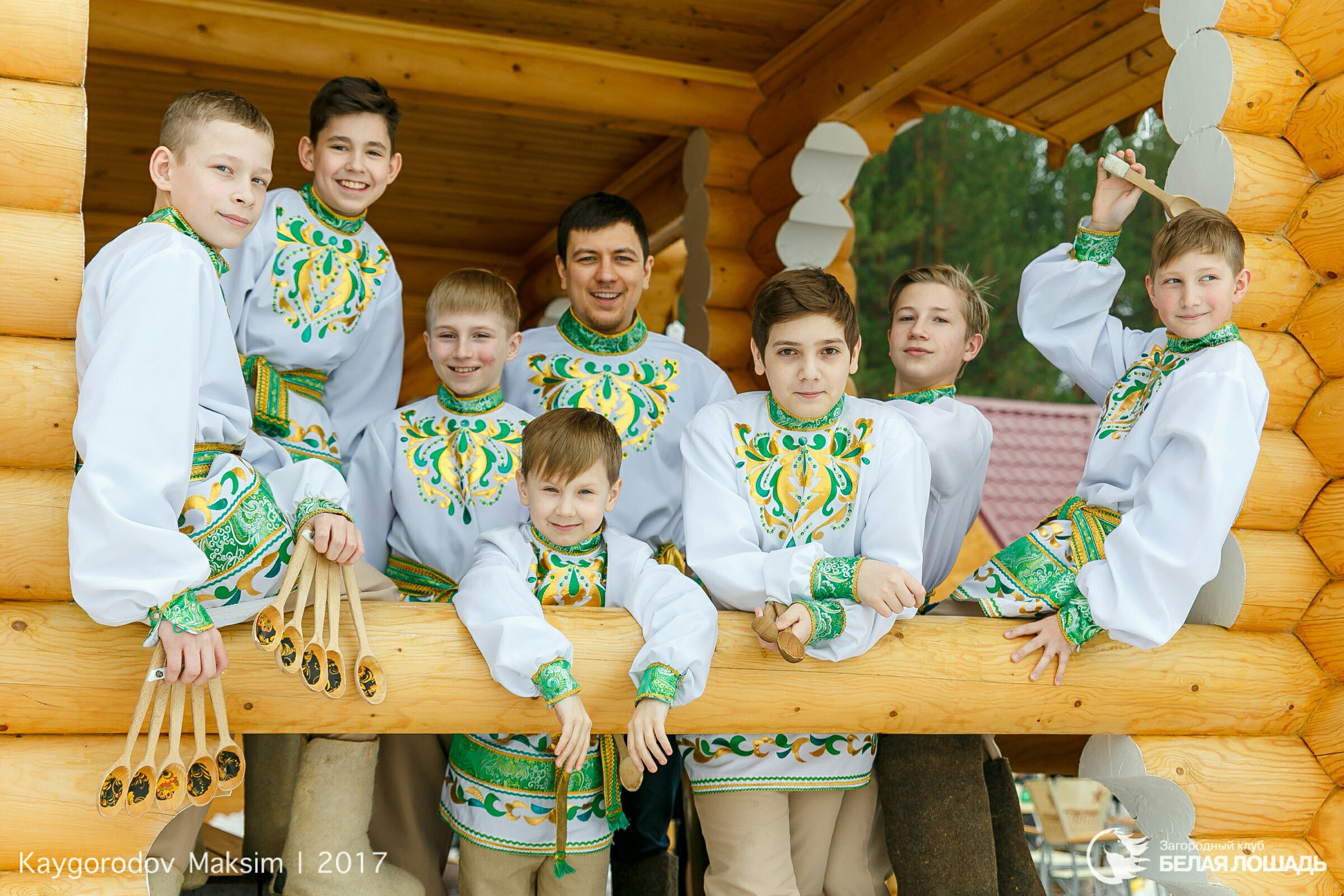 Детский коллектив Парни Саб Ложки jr.